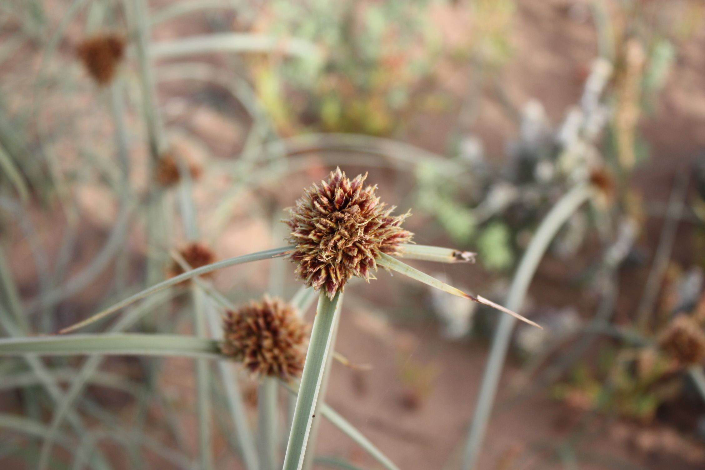 Cyperus capitatus, Fotografiert in Marokko